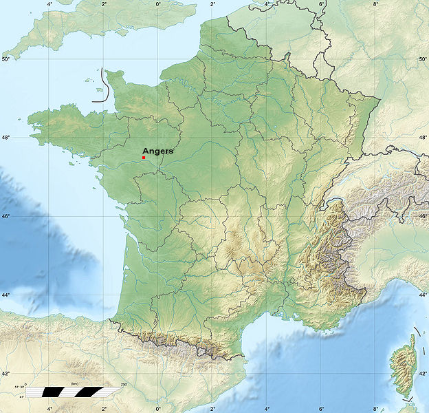 Carte relief Localisation Angers